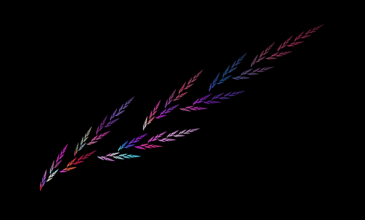 créé sous apophysis